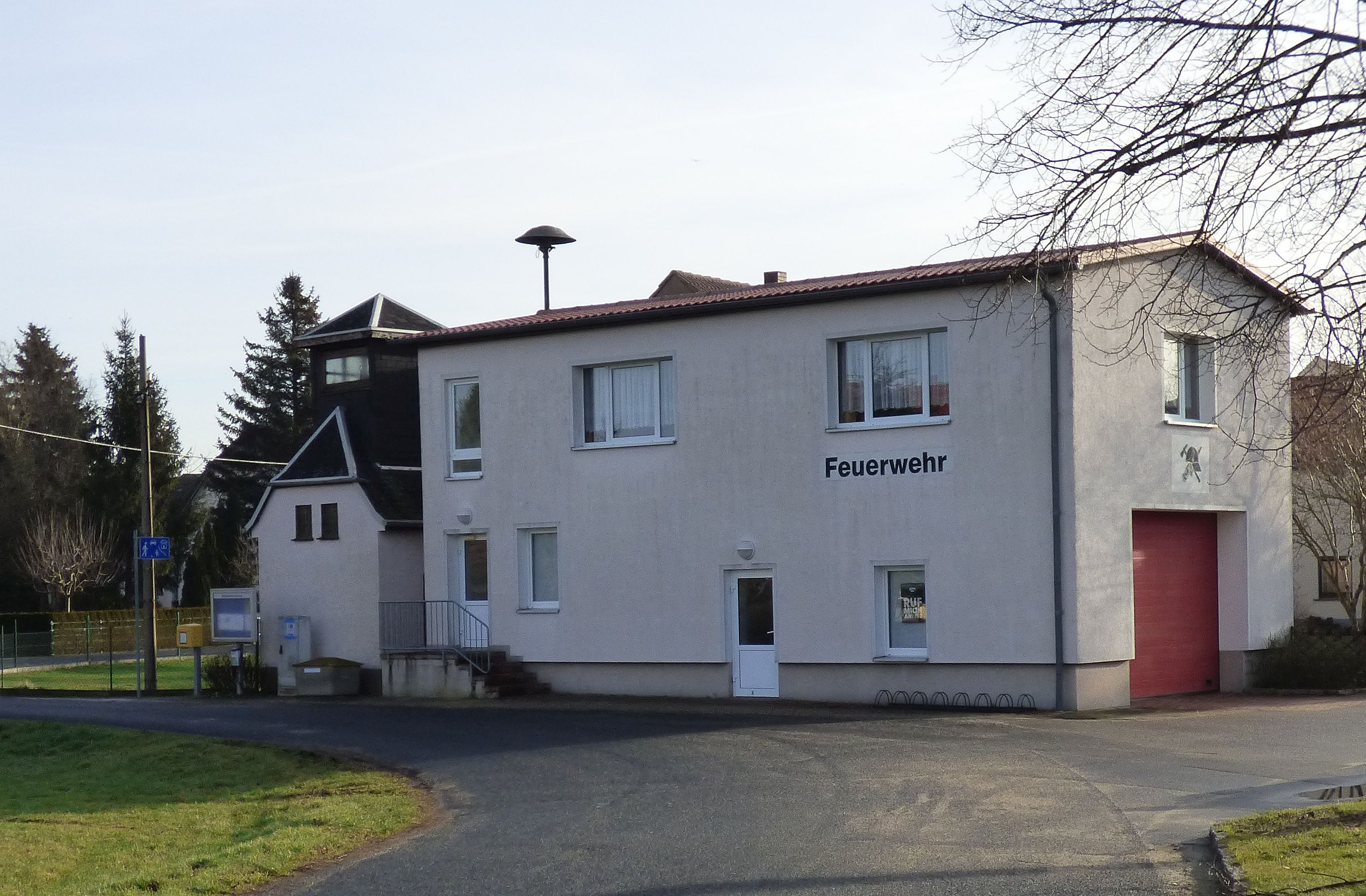 Skaup